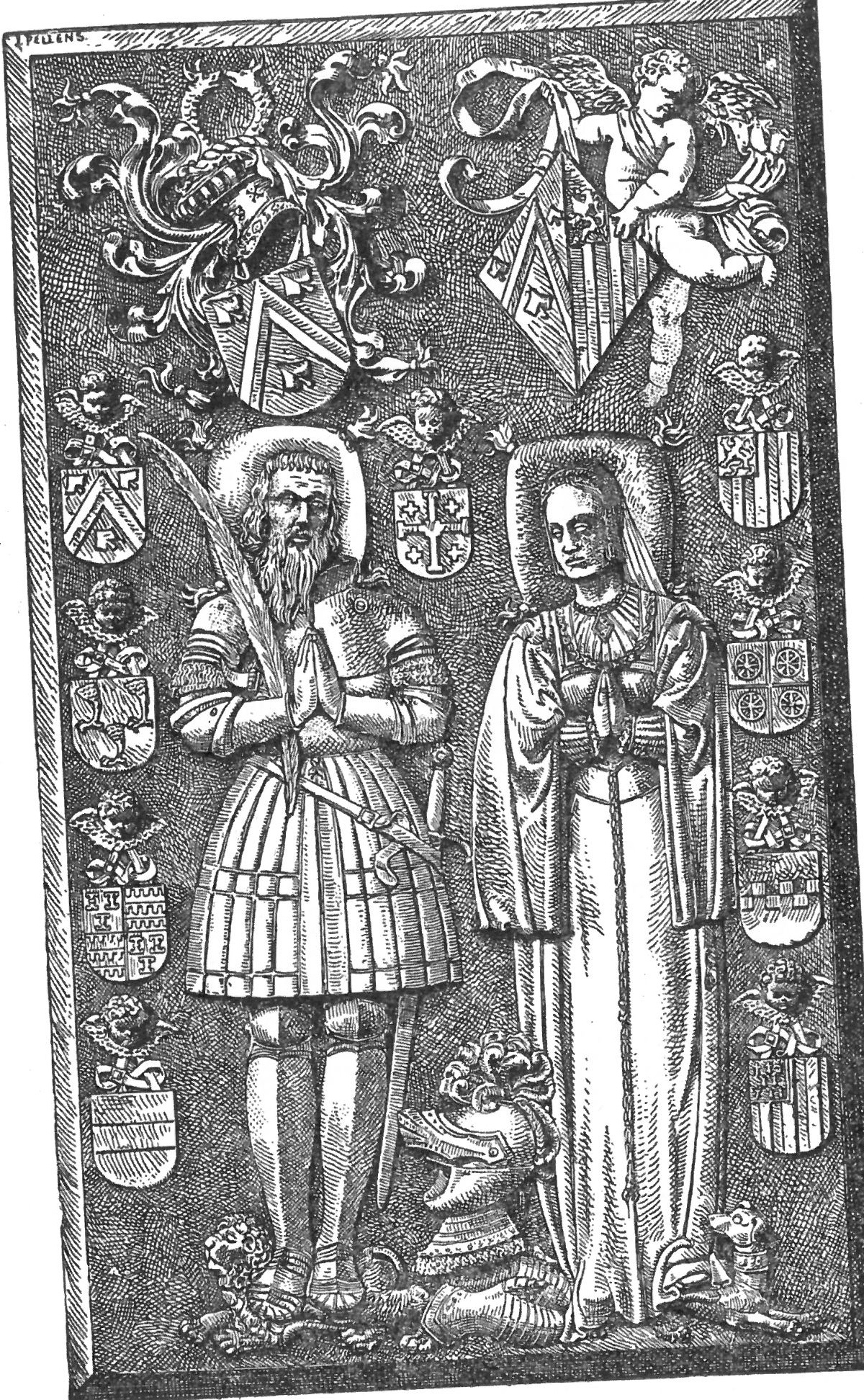 Grafsteen Jan van Leefdael en Cornelia van Ranst